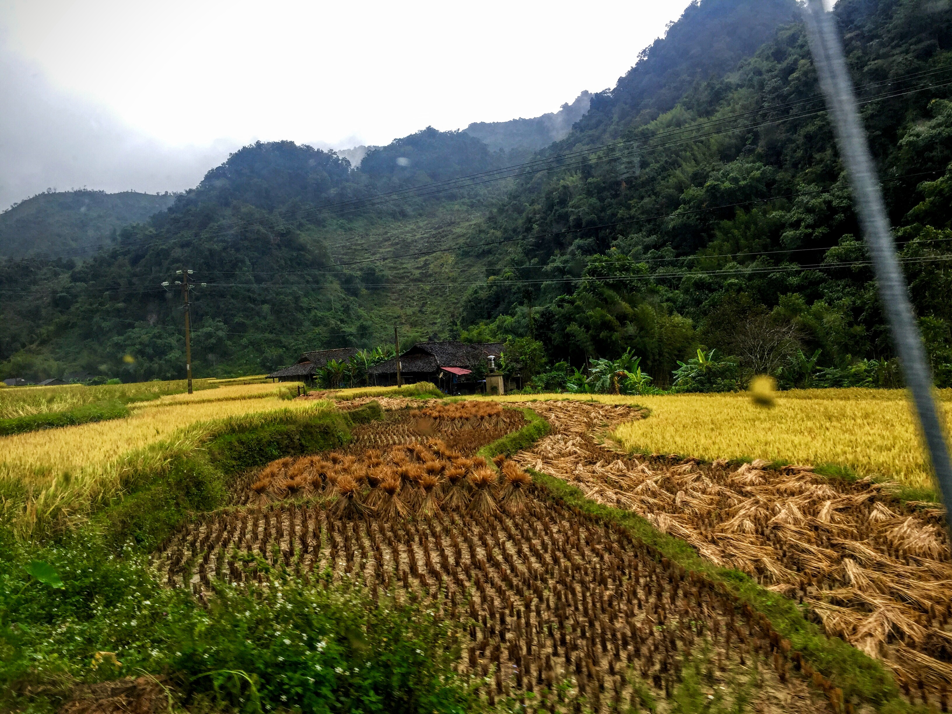 Ca Thành, Nguyên Bình, Cao Bằng, Vietnam